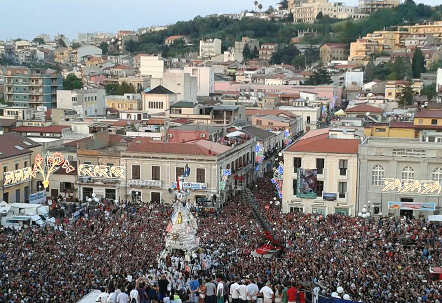 La Varia di Palmi del 2013 all'arrivo e sosta finale in piazza I maggio